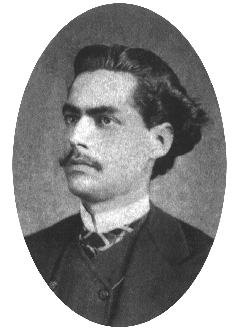 Retrato do poeta Castro Alves.